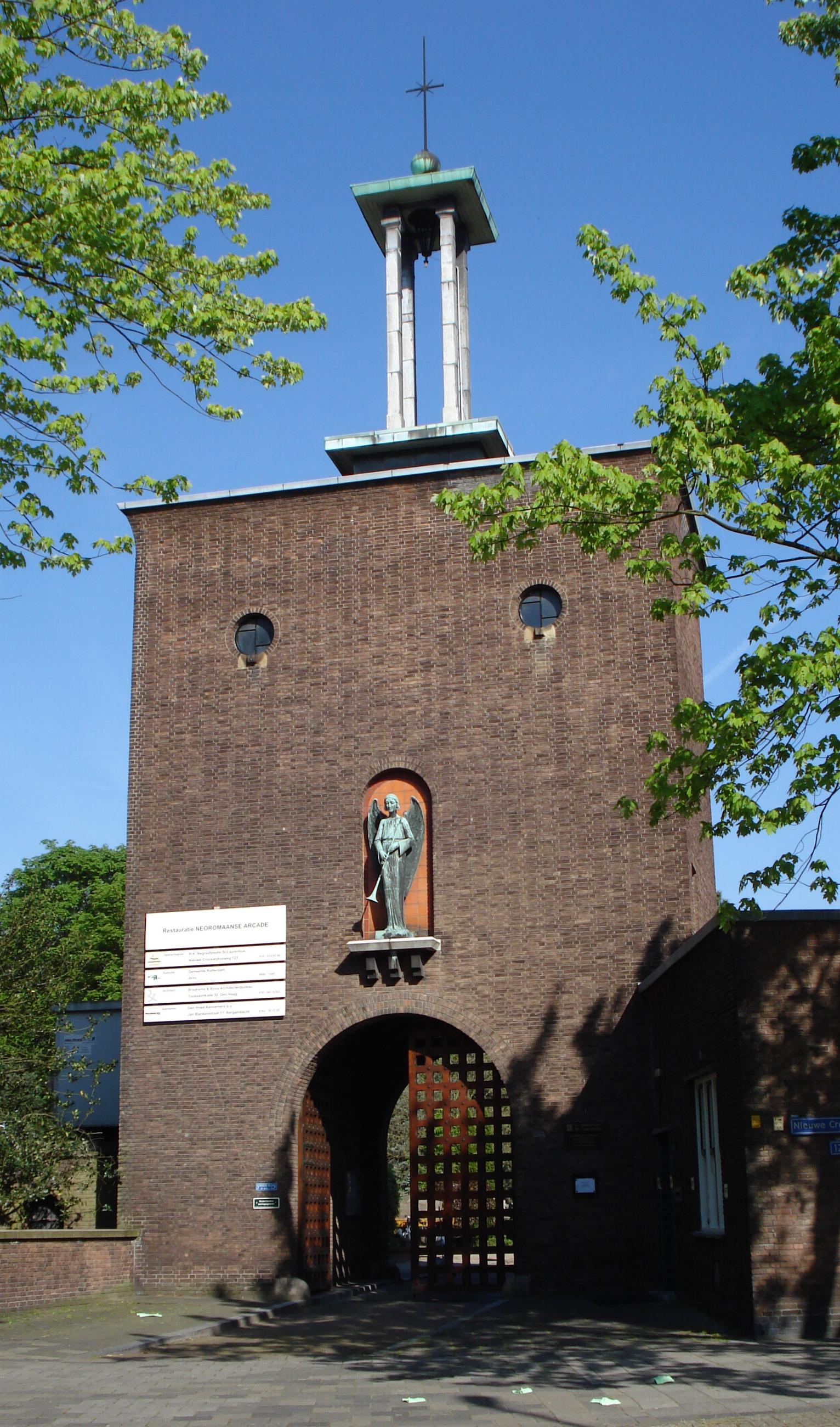 Rotterdam, Begraafplaats Nieuw Crooswijk. Poortgebouw. Gemeentemonument.